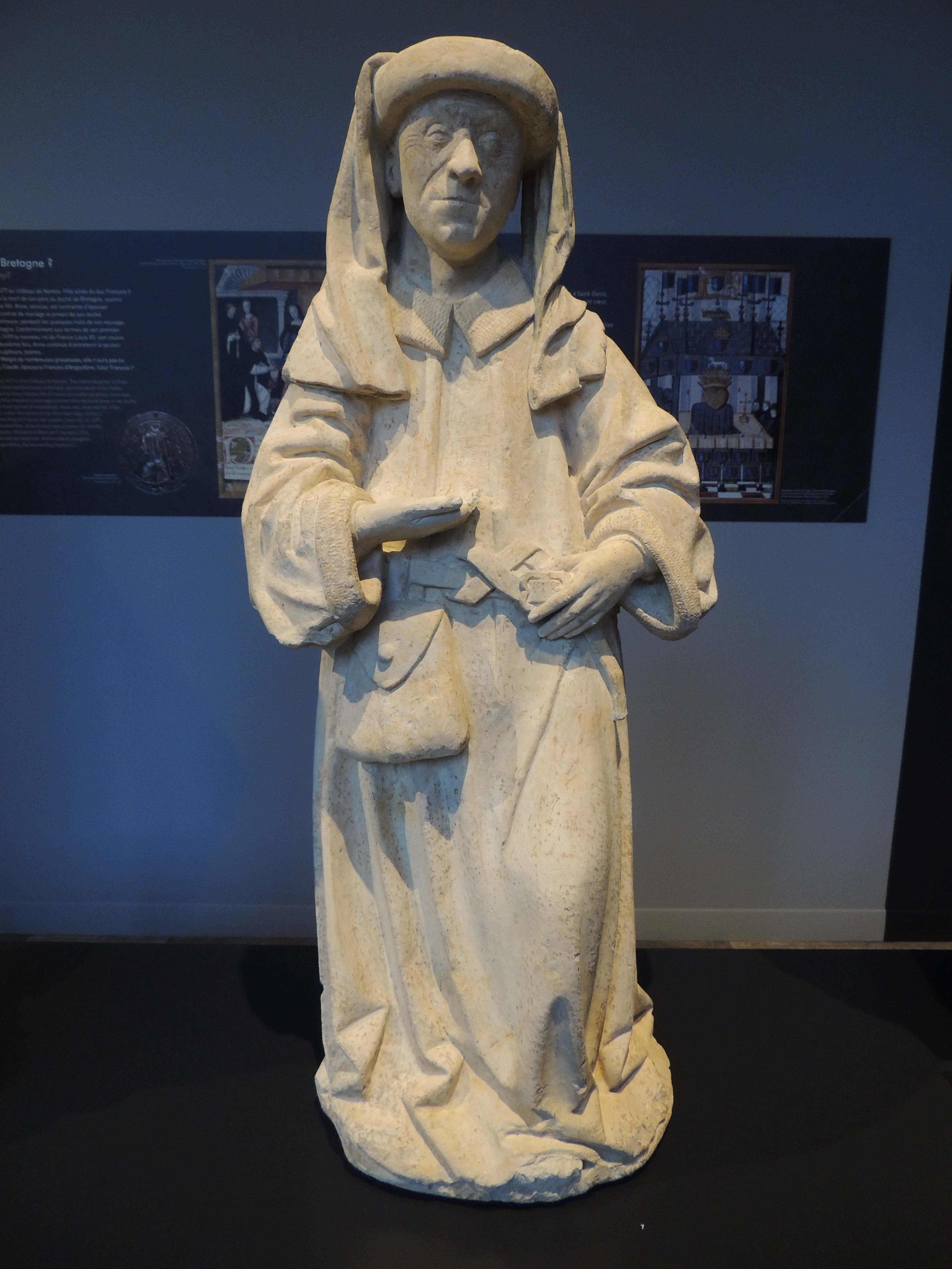 Statue de saint Matthieu (?) provenant de l'ancien couvent des Carmes de Nantes, en France conservée par le musée départemental Thomas-Dobrée à Nantes. A sa ceinture est accrochée une bourse de collecteur d'impôts, antithèse de l'aumonière.